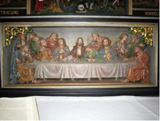 Abendmahl St.-Martins-Kirche Zetel, gefertigt durch Holzbildhauer Wilhelm Kunst